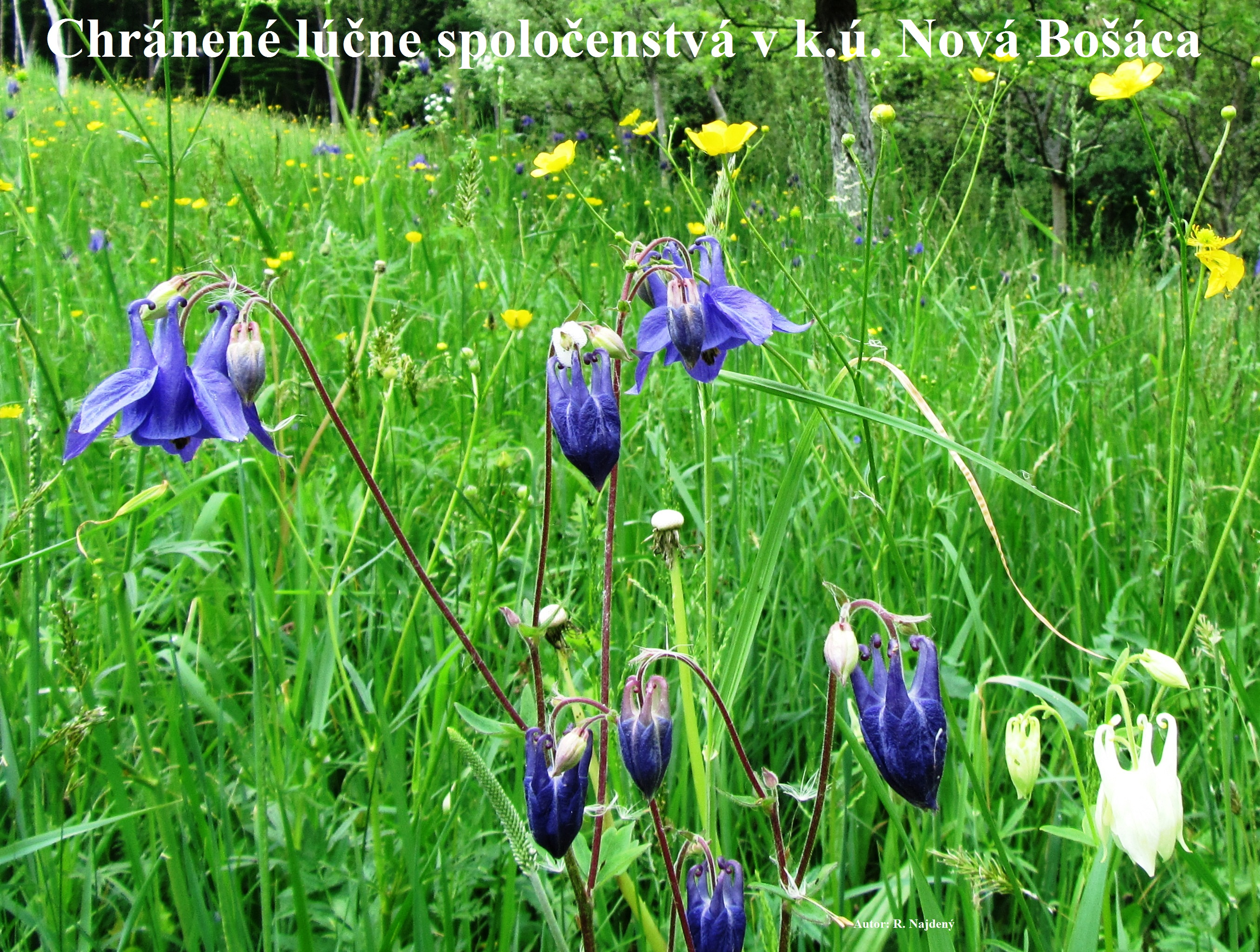 rastlinstvo nova bosaca